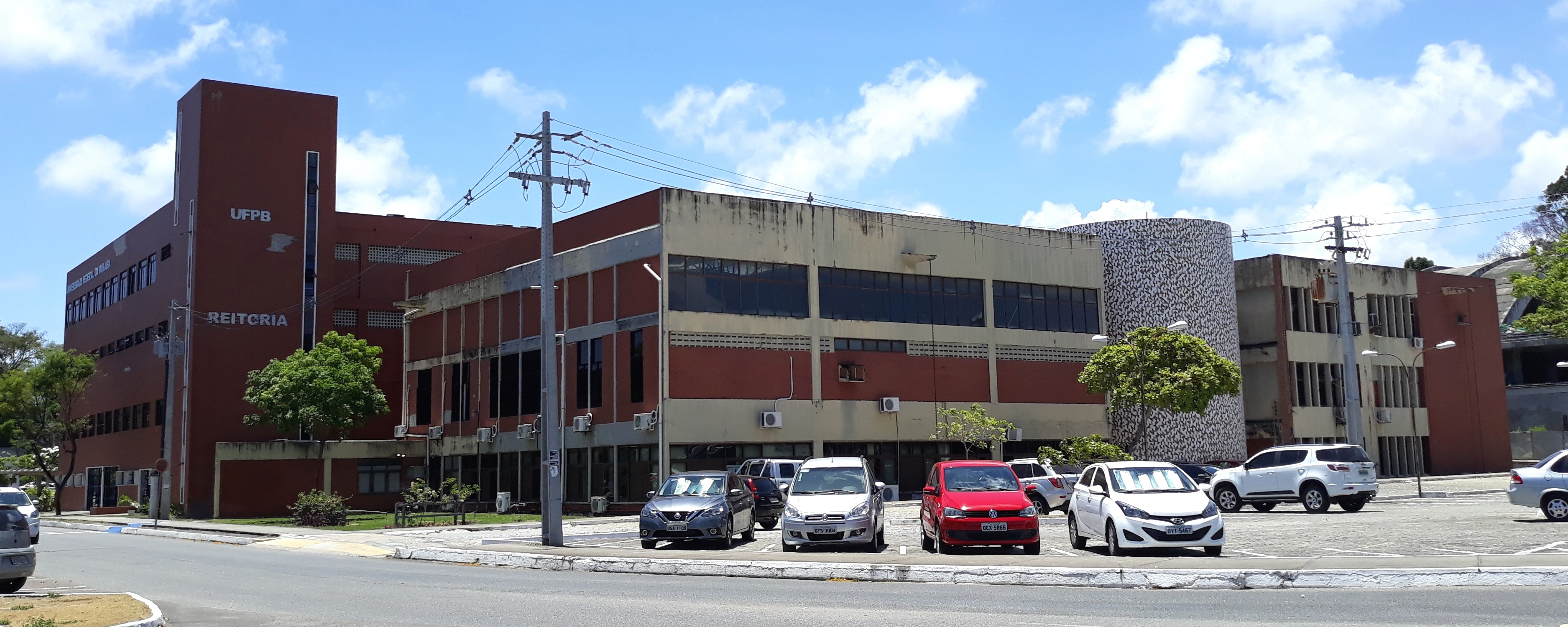 Reitoria da UFPB em João Pessoa, Paraíba (Brasil)